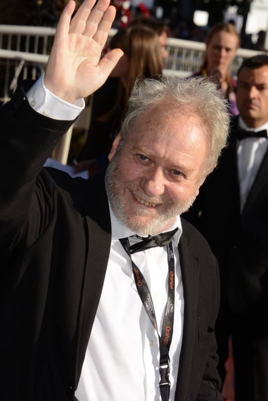 Jackie Berroyer au festival de Cannes